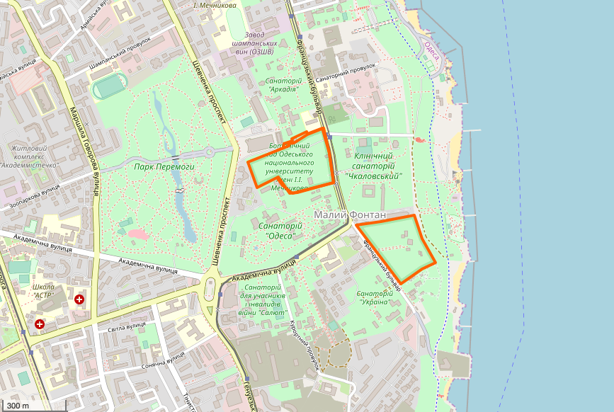 Carte des deux parcelles du jardin botanique, au centre-ville d'Odessa, Ukraine